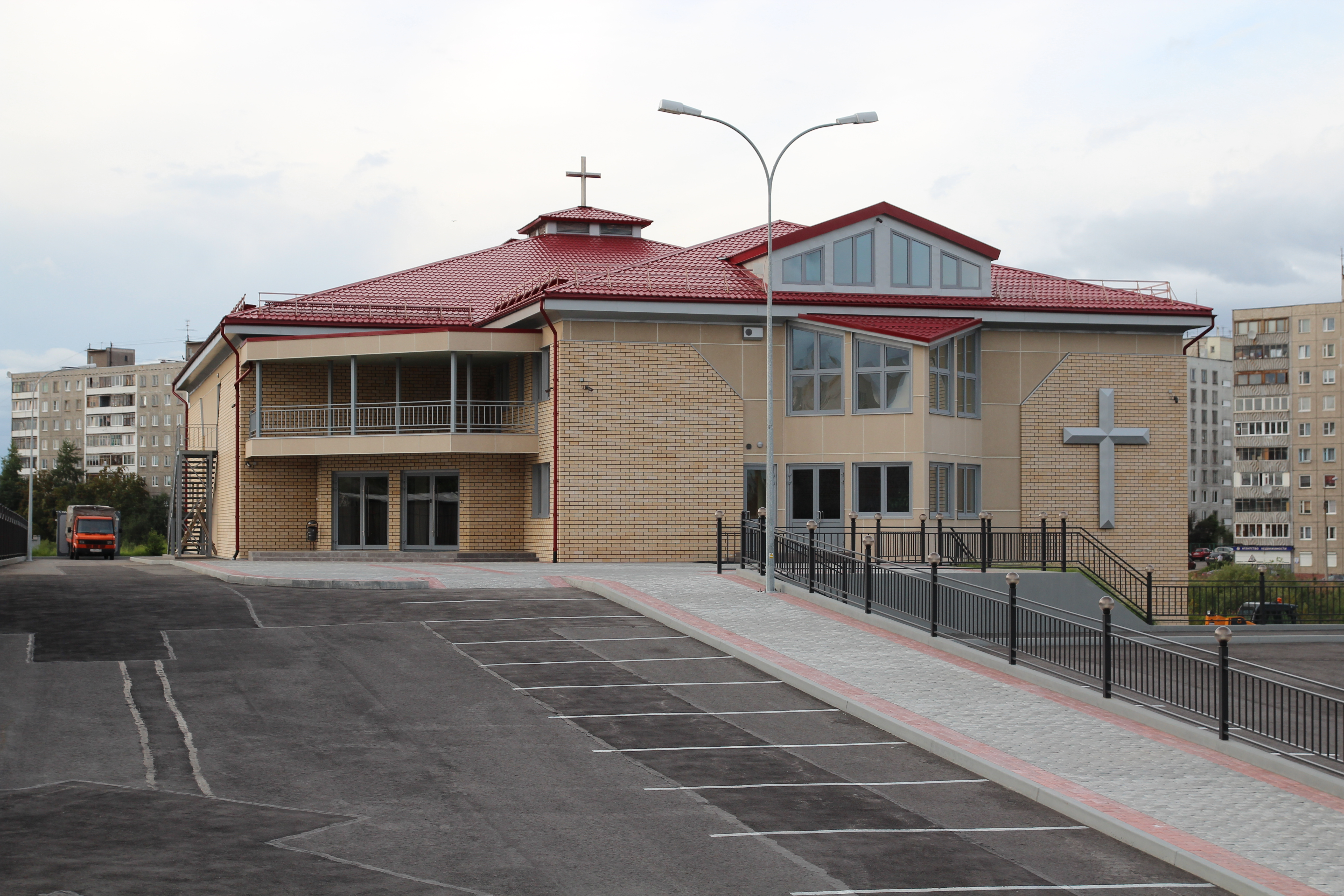 Церковь христиан веры евангельской (Мурманск).jpg